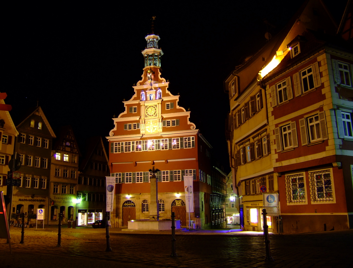 Das Lichtbild zeigt das Alte Rathaus der einst Freien Reichsstadt Eßlingen am Neckar, heute Große Kreisstadt Esslingen am Neckar Aufgenommen am 18. November 2006 durch Benutzer MBL. Kamera Fujifilm Finepix E900 -Metadaten